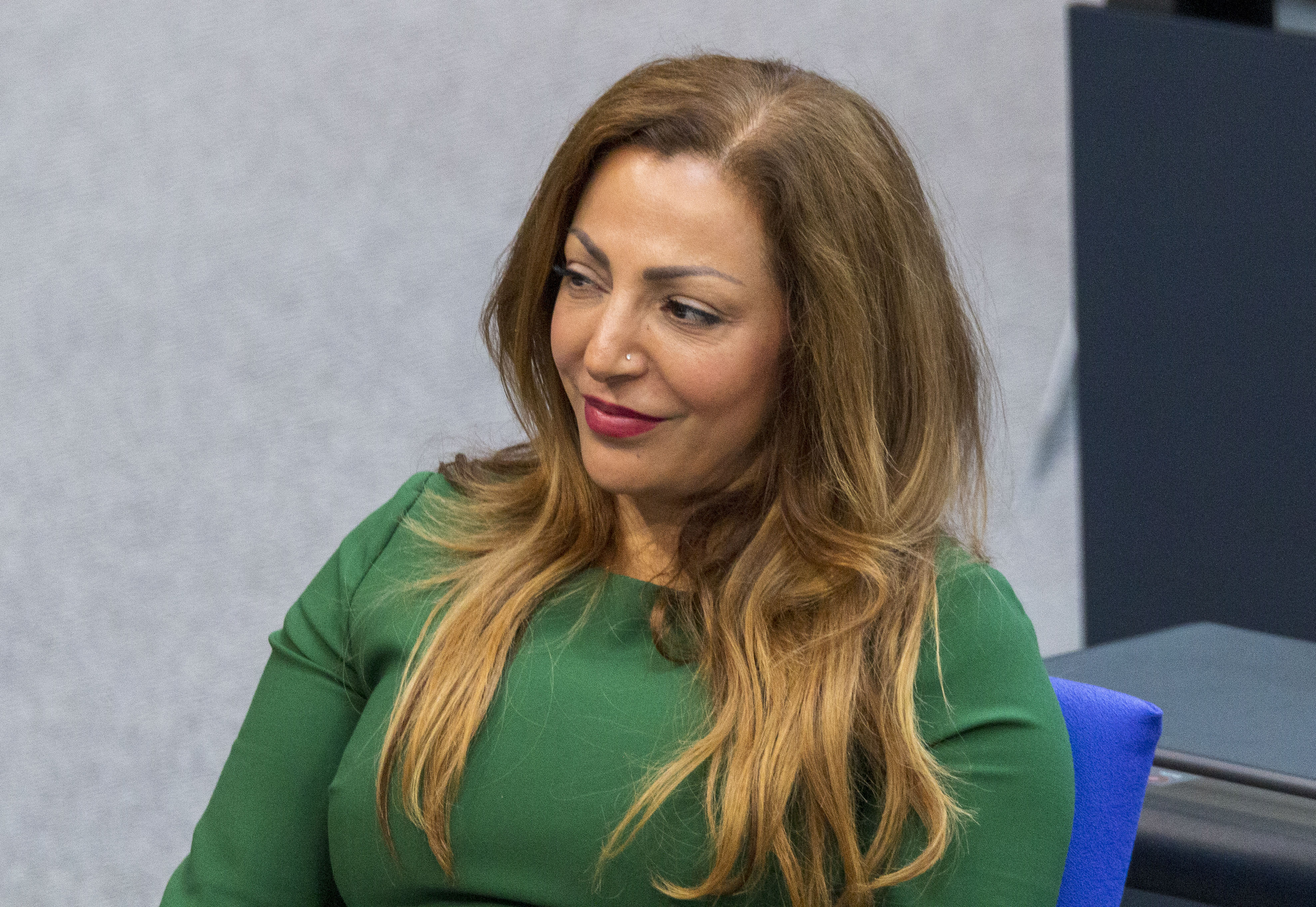 Evrim Sommer während einer Plenarsitzung des Deutschen Bundestages am 2. Juli 2020 in Berlin.